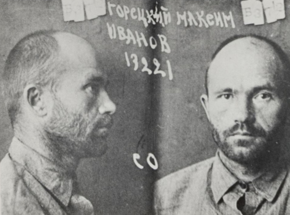 Беларуская (тарашкевіца): Максім Гарэцкі, 1930 г. Фота з асабістай справы НКУС . Максім Гарэцкі асуджаны за ўдзел у «Саюзе вызваленьня Беларусі».